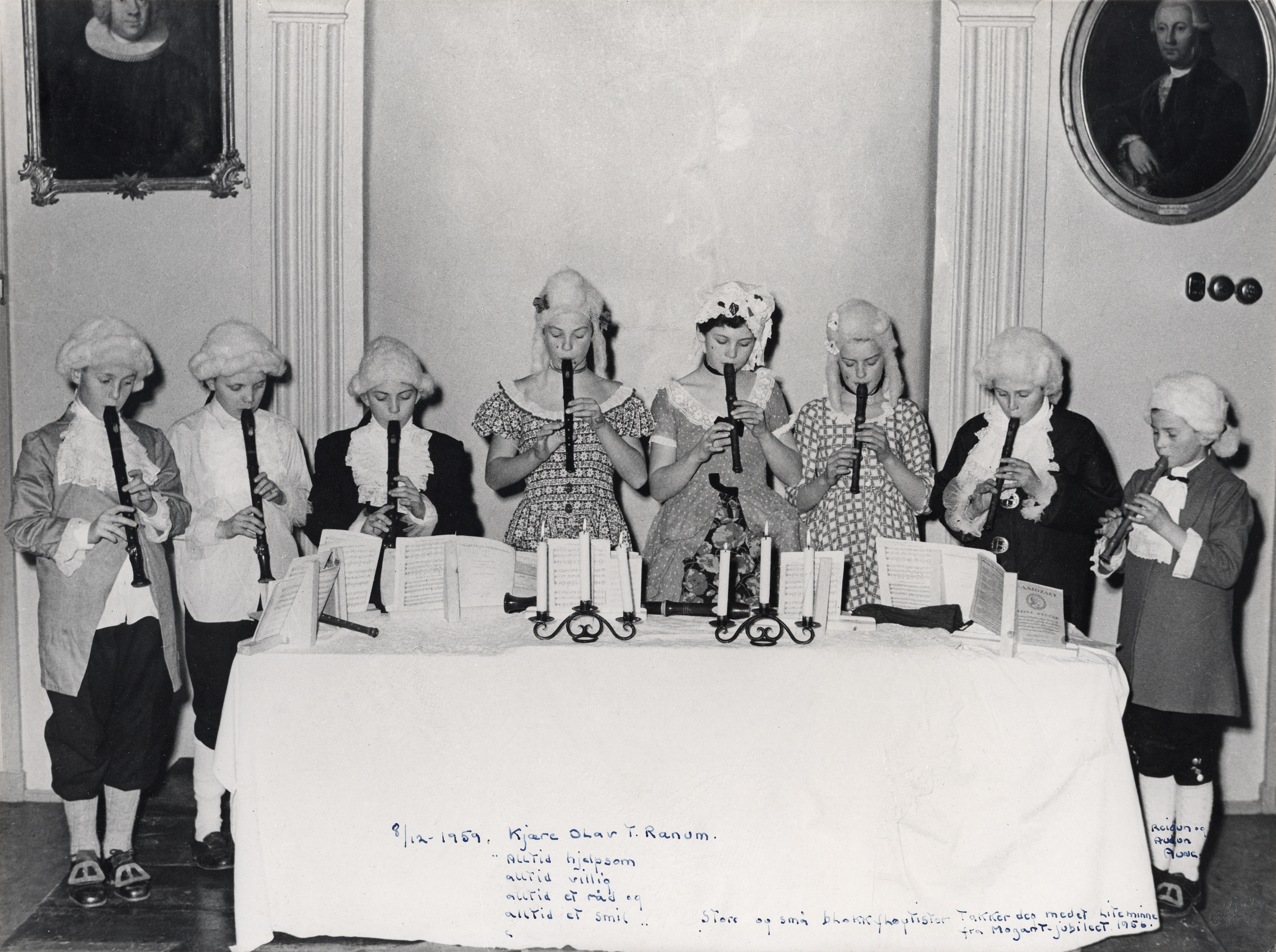 Format: Fotopositiv Dato / Date: 8 Desember 1956 Fotograf / Photographer: Schrøder Sted / Place: Trondheim Wikipedia: Blokkfløyte Wikipedia: Olaf T. Ranum (1914 - 2004) Eier / Owner Institution: Trondheim byarkiv, The Municipal Archives of Trondheim Arkivreferanse / Archive reference: TorH45 - F9478 Merknad: Bildet har ukjent opprinnelse, men er antagelig donert Byarkivet av Olaf T. Ranum (1914 - 2004). Billedtekst: 08.12.59. Kjære Olav T. Ranum. - alltid hjelpsom - alltid villig - alltid et råd og - alltid et smil. Store og små blokkføytister takker deg med et lite minne fra Mozart-jubileet 1956. Reidun og Audun Aune.